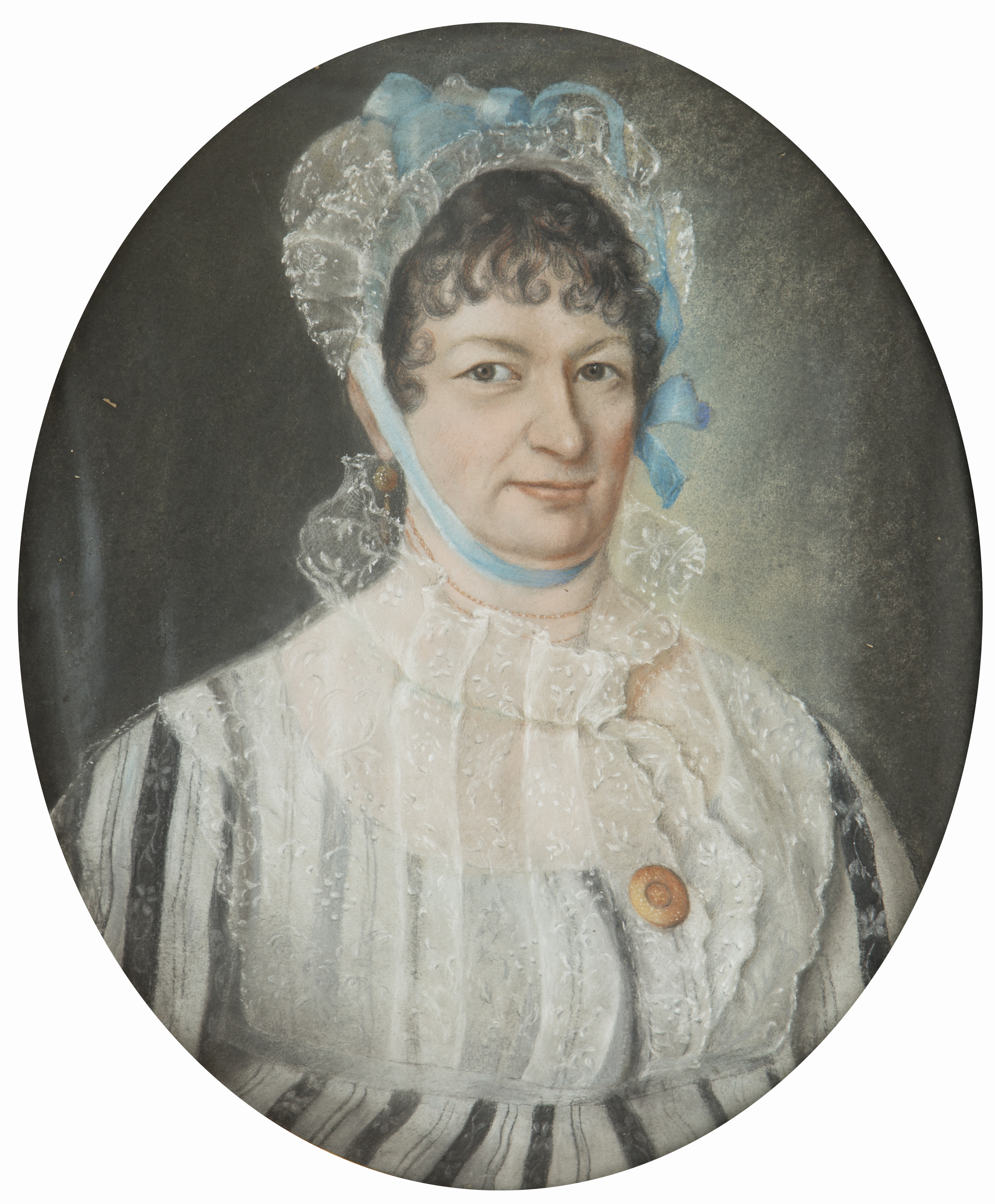 Porträtt av Lovisa Christina Schönherr, född Herman (1745-1819). Gift med sidenhandlaren i Stockholm Johan Christian Schönherr. Porträtt från ca 1800 av okänd konstnär.